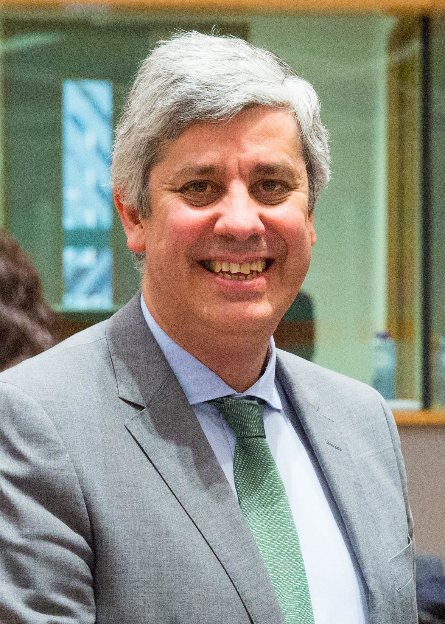 (C) Schneider - Brüssel (Belgien) - 22.01.2018 - Heute reiste Finanzminister Hartwig Löger (ÖVP) zu seinem Antrittsbesuch bei der EU nach Brüssel. PHOTO: Finanzminister Hartwig Löger mit dem Eurogruppenvorsitzenden Mario Centeno kurz vor seiner ersten Sitzung in der Eurogruppe.